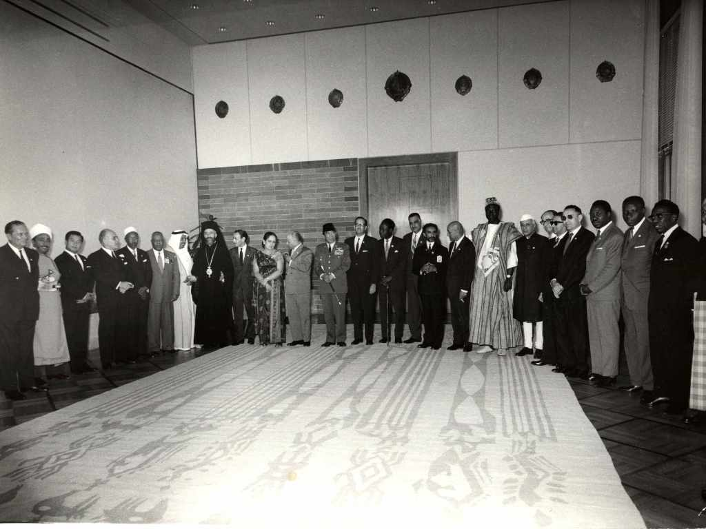 Srpski (latinica): Lideri pokreta nesvrstanih u Beogradu 1961. godine